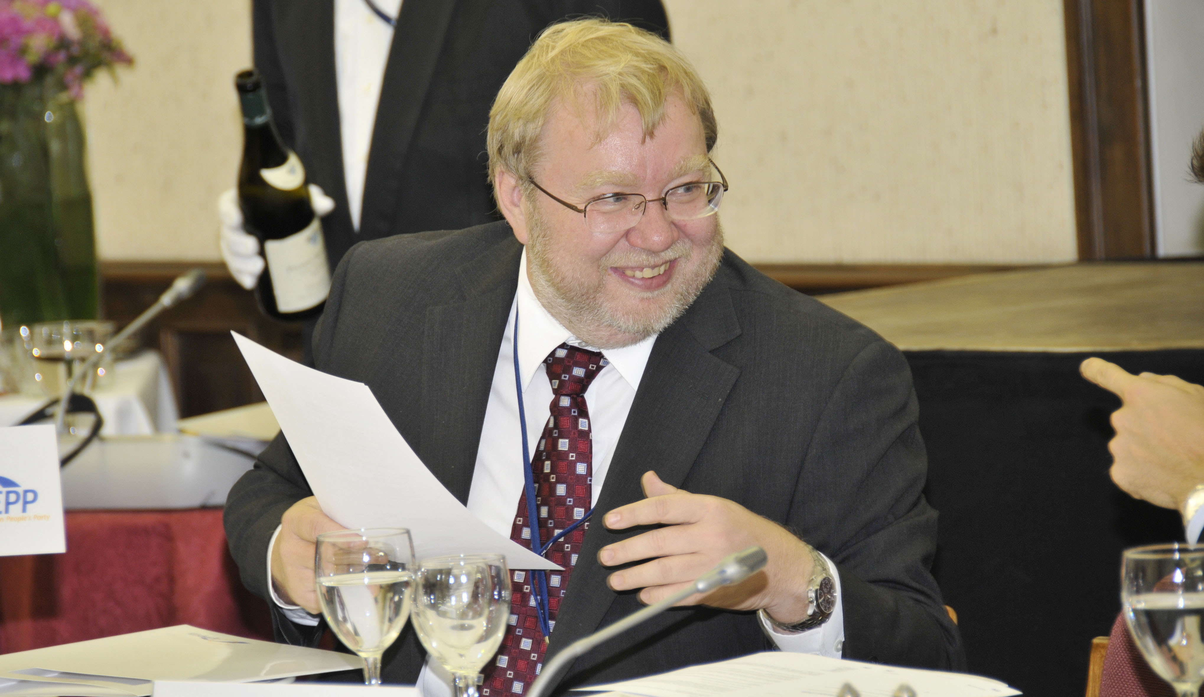 EPP Summit September 2010